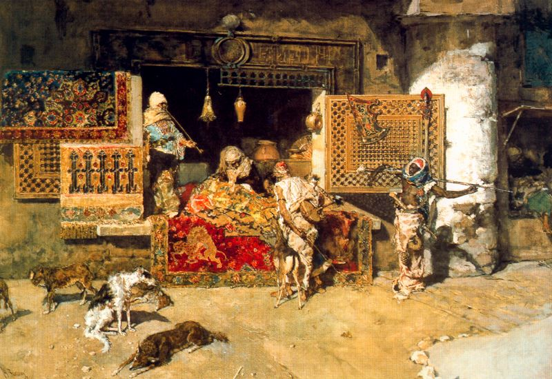 Catalan: El venedor de tapissoslabel QS:Lca,"El venedor de tapissos"